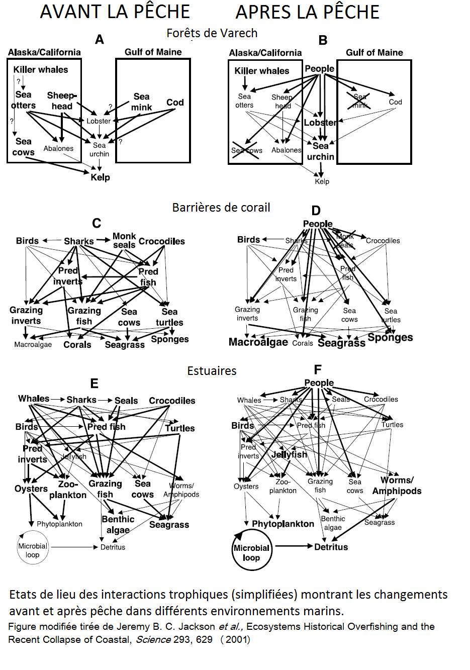 Réseaux trophiques simplifiés avant et après la pêche